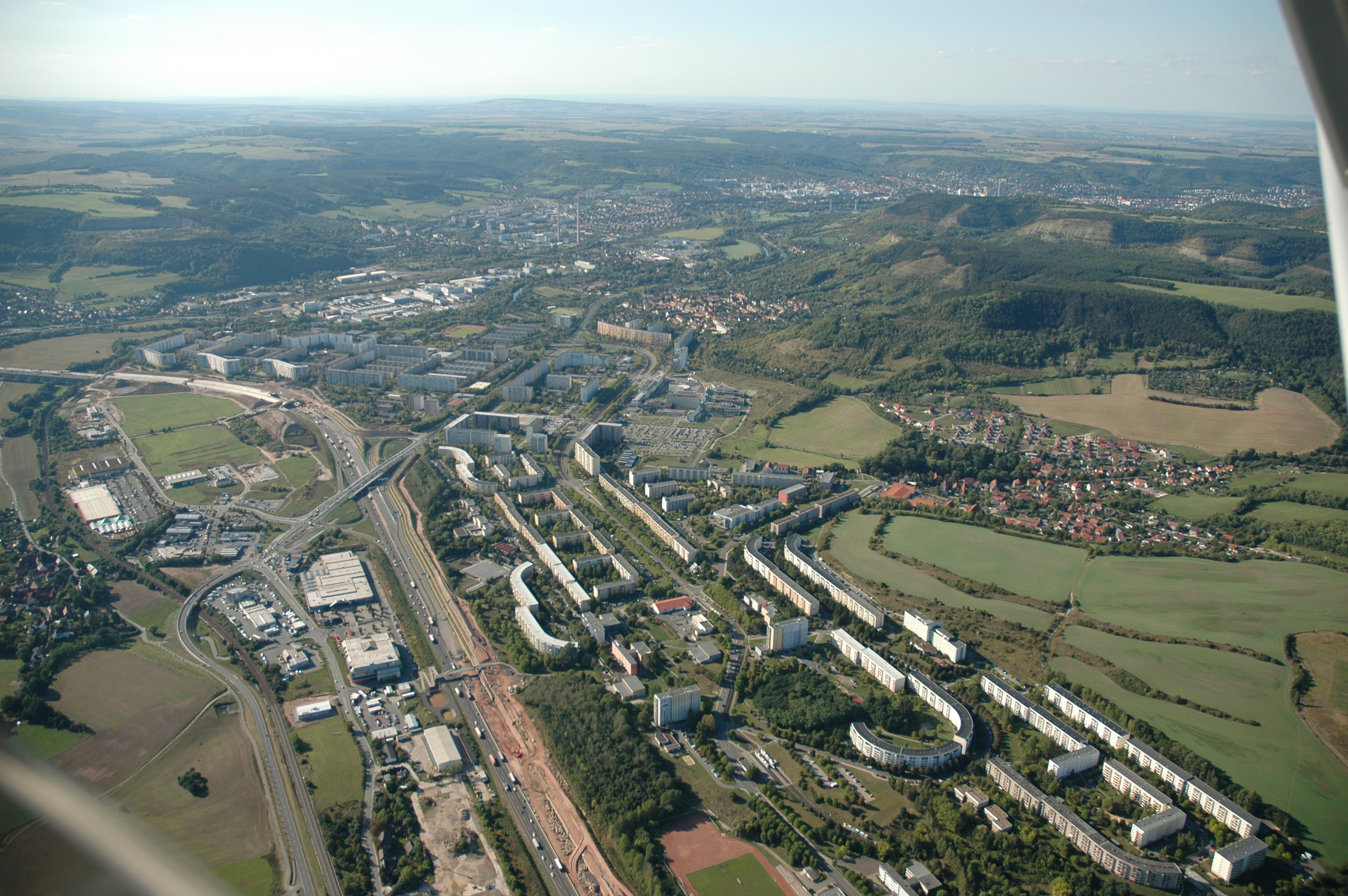 Jena Lobeda - Luftaufnahme September 2008